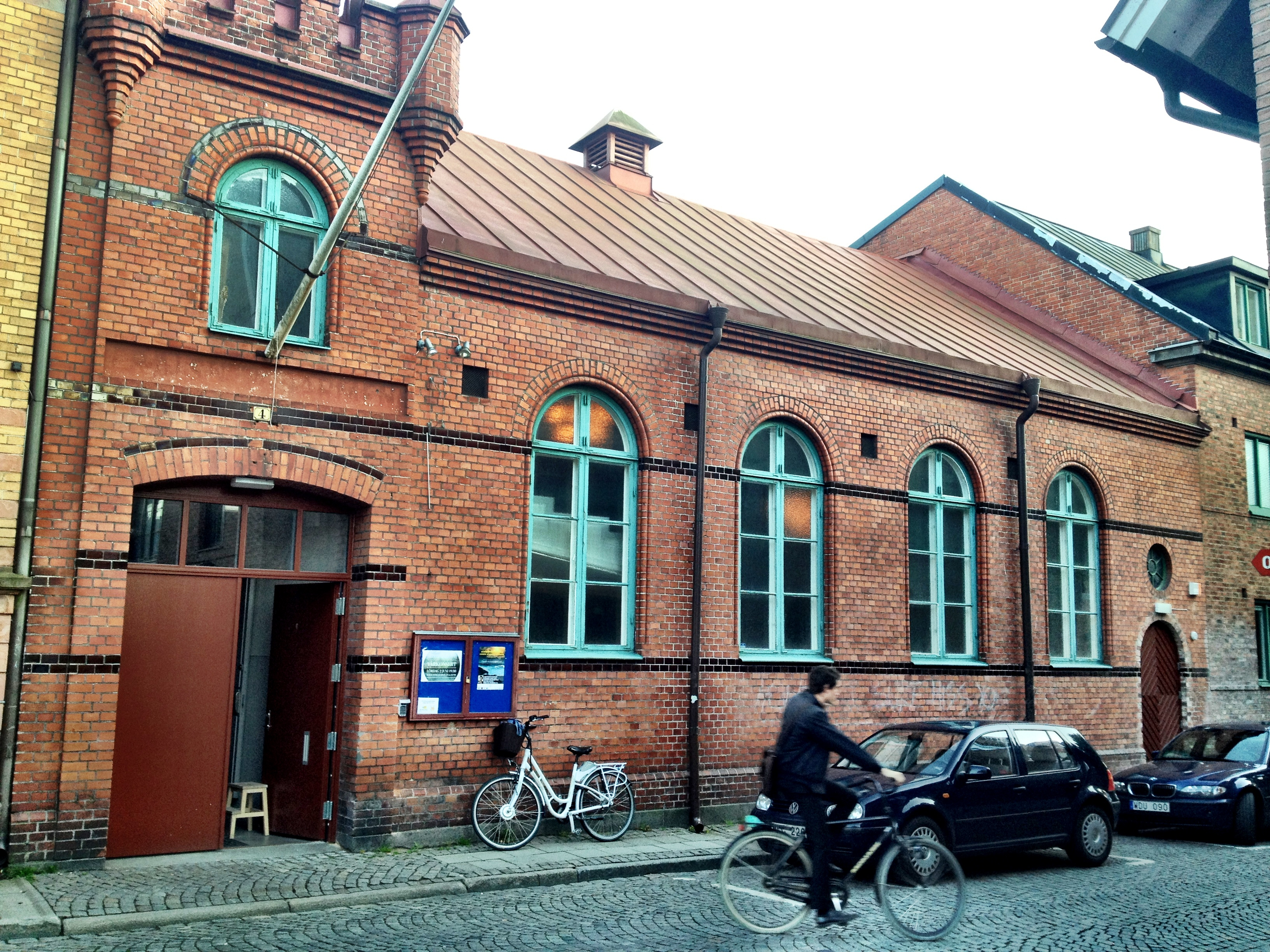 Magle Konserthus - exteriör. Foto från 2012